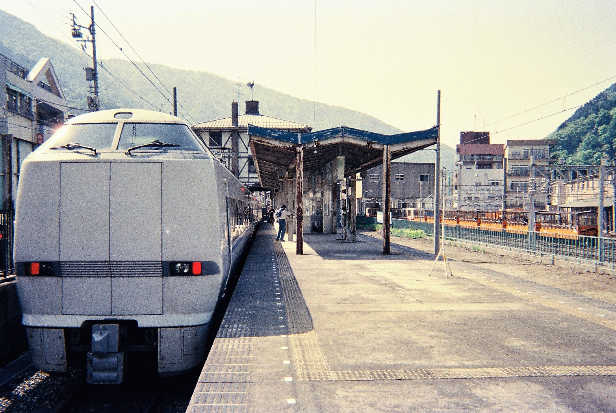 富山地方鉄道宇奈月温泉駅に停車中の「サンダーバード宇奈月」大阪行き681系（1998年5月撮影）